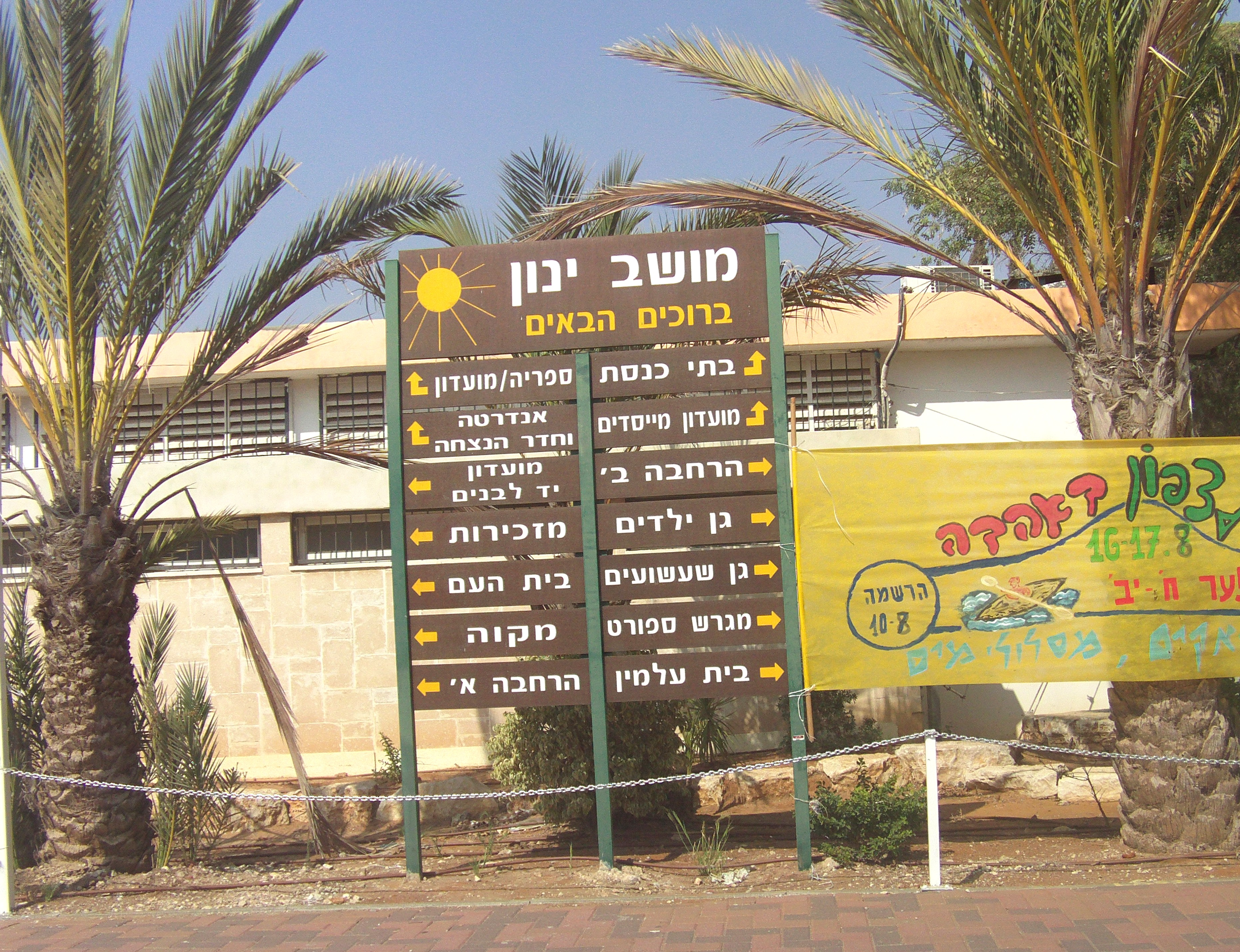 מושב ינון כניסה לינון